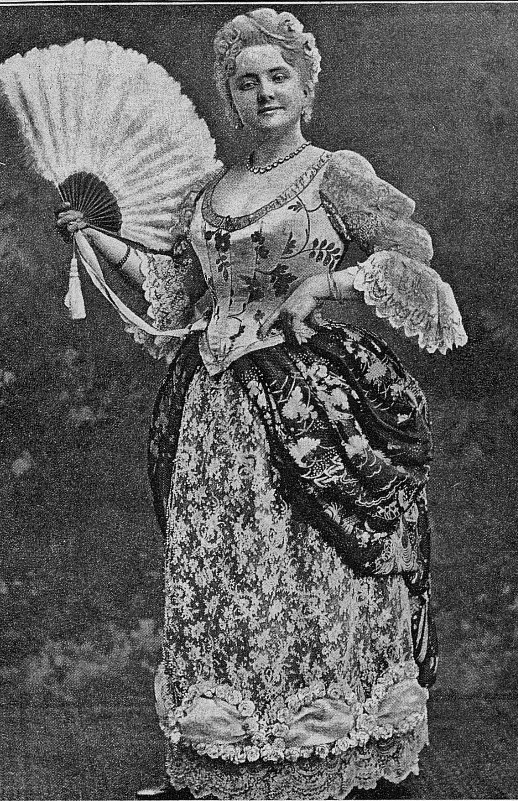 Rose Delaunay. Illustration du supplément n° 3 au numéro du 25 décembre 1892 de la revue Chronique artistique